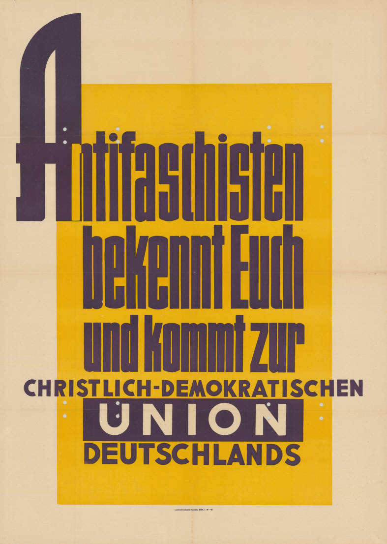 Antifaschisten bekennt Euch und kommt zur Christlich-Demokratischen Union Deutschlands Plakatart: Textplakat Allgemein Auftraggeber: CDUD Drucker_Druckart_Druckort: Landesdruckerei Sachsen. 8500. 1.46 - 65 Objekt-Signatur: 10-024 : 3181 Bestand: Plakate aus der SBZ/DDR (10-024) GliederungBestand10-18: Ost-CDU / CDUD / Exil-CDU Lizenz: KAS/ACDP 10-024 : 3181 CC-BY-SA 3.0 DE